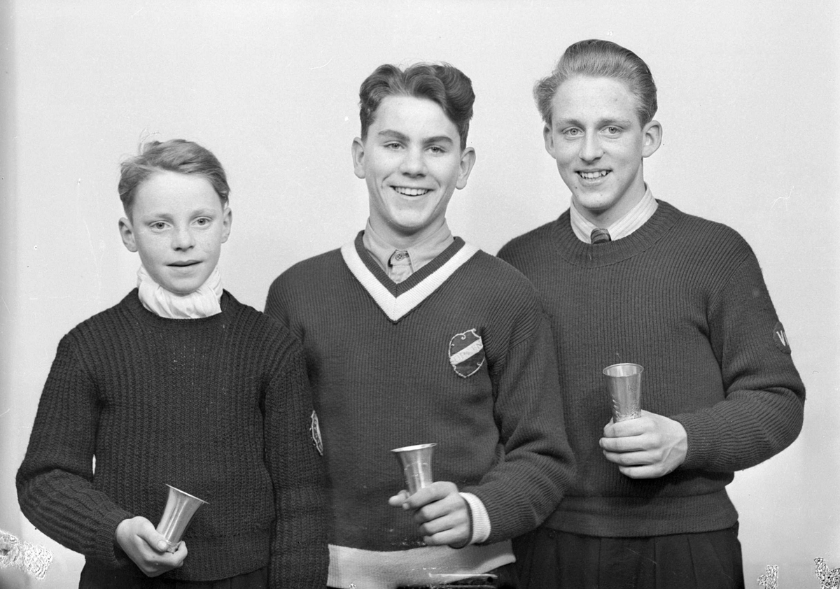 Klassevinnere i hopp under hovedlandsrennet for gutter i Trondheim. Fra venstre Frank Hansen, Axel Pettersen og Tormod Knutsen